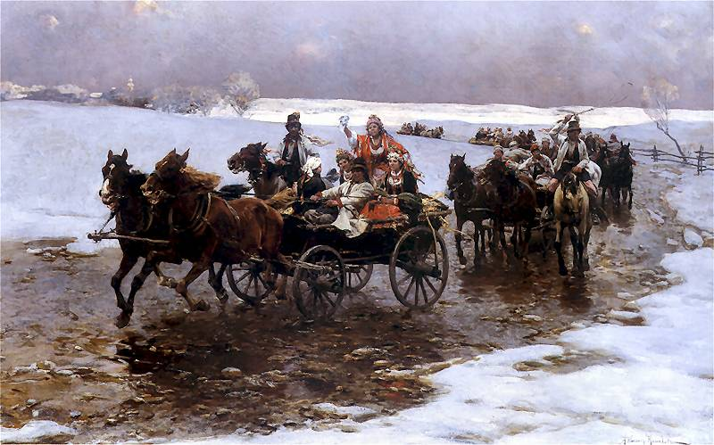 Краковская свадьба. 1876-78.